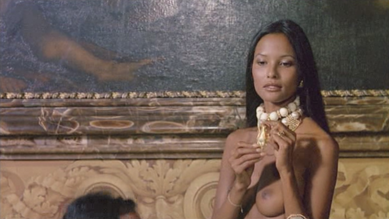 Laura Gemser en un fotograma del film Emanuelle in America, dirigido por Joe D'Amato en 1977.